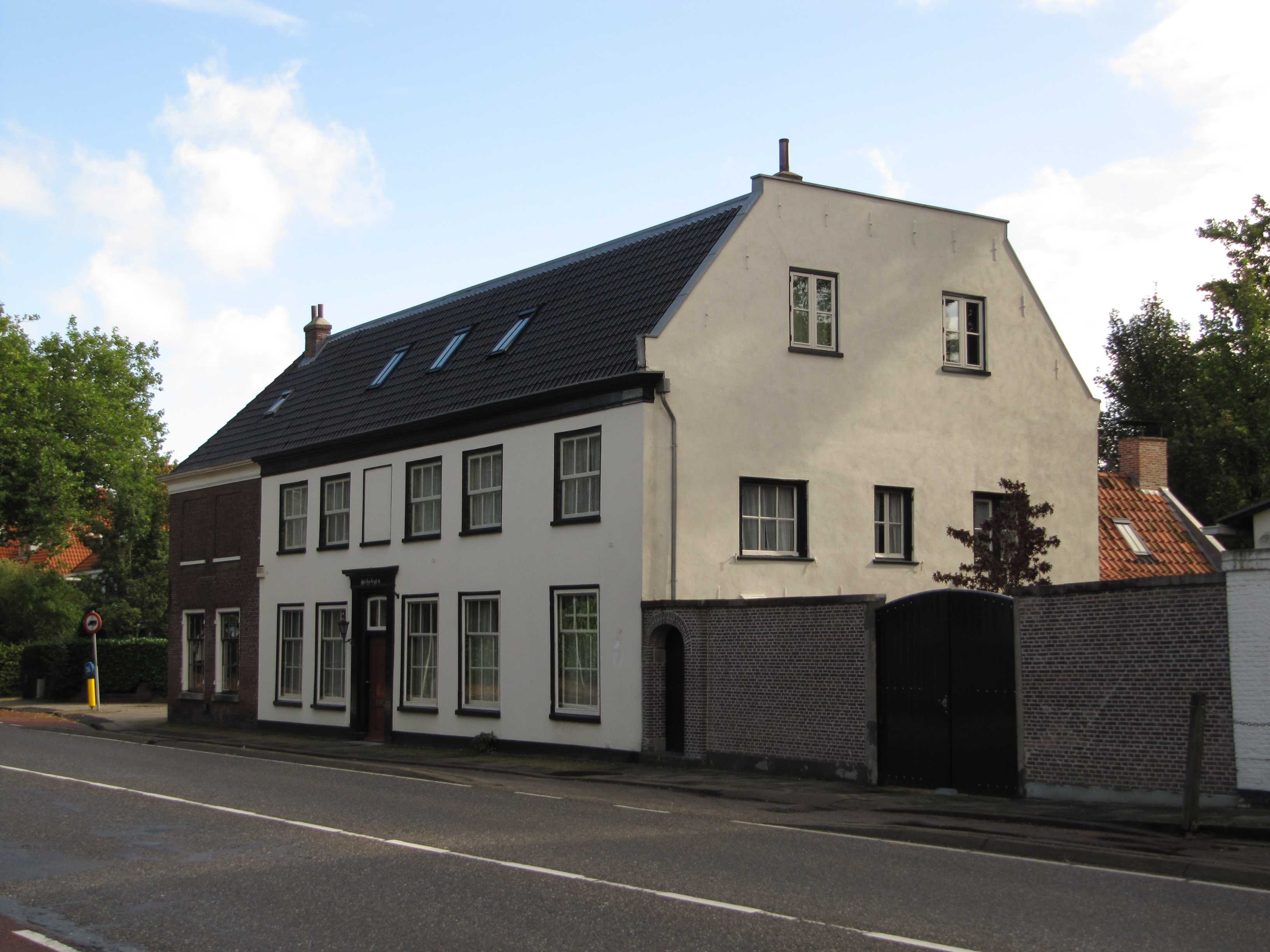 RM21111 Heemstede - Herenweg 142.jpg